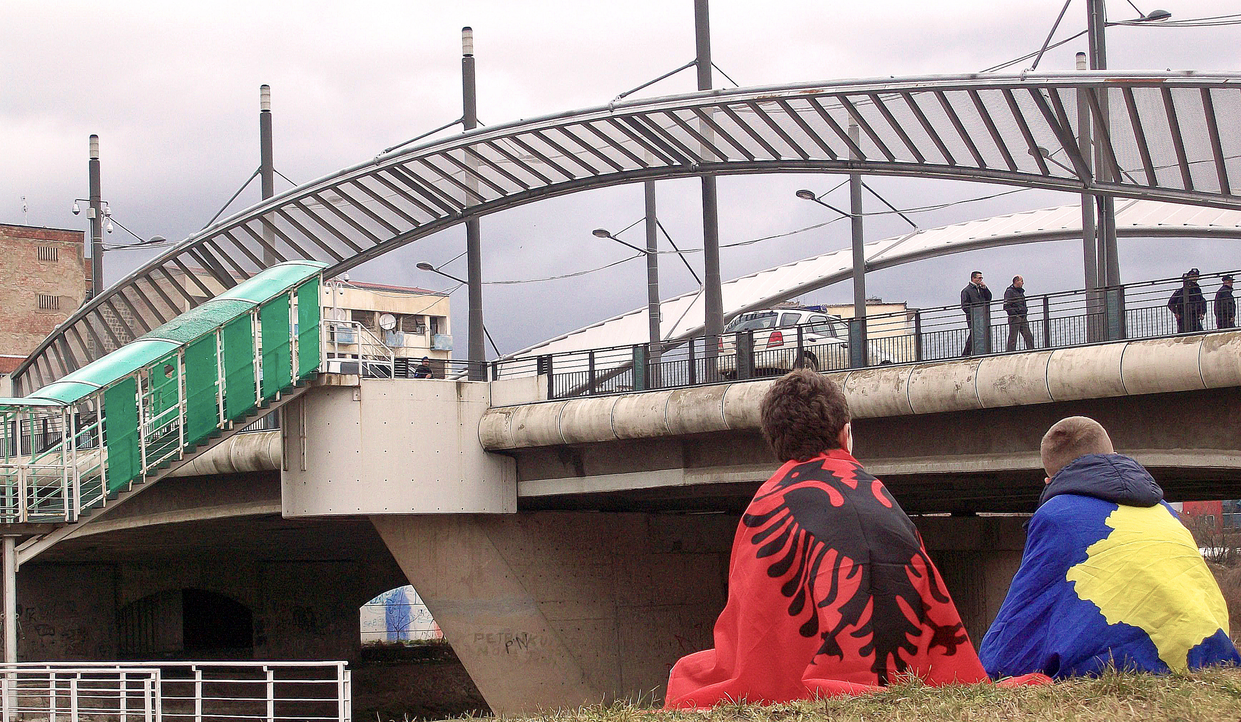 Fotografi me rastin e festimeve të pavarësisë së Kosovës